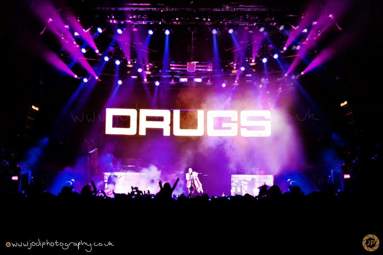 Marilyn Manson tocando "The Dope Show" en vivo en el 2012, durante la gira "Hey Cruel World.... Tour"